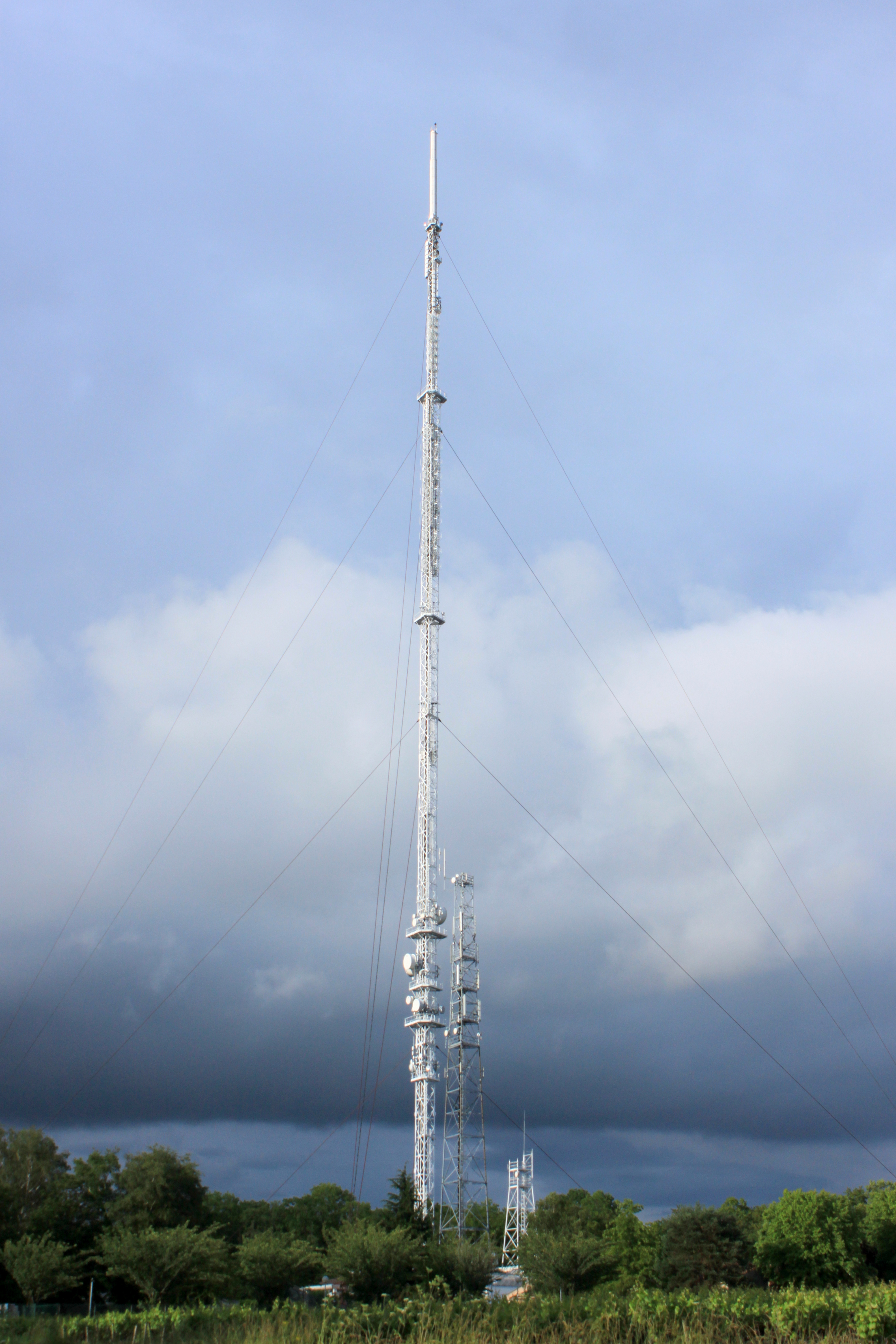 Tour TV, la Louée, Fr-44-Haute-Goulaine. Construit par TDF, en 2003.